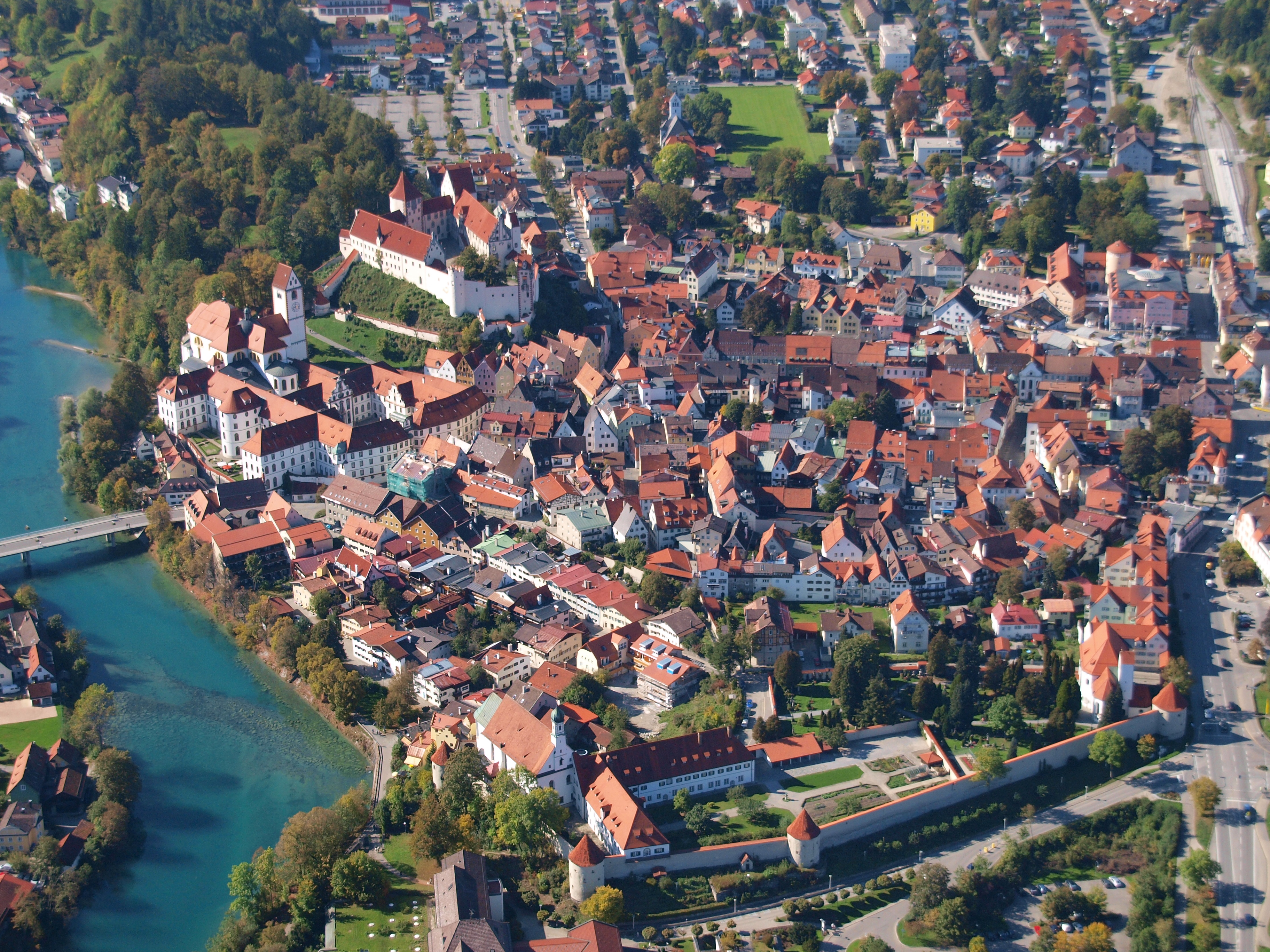 Luftaufnahme von Füssen aus östlicher Richtung